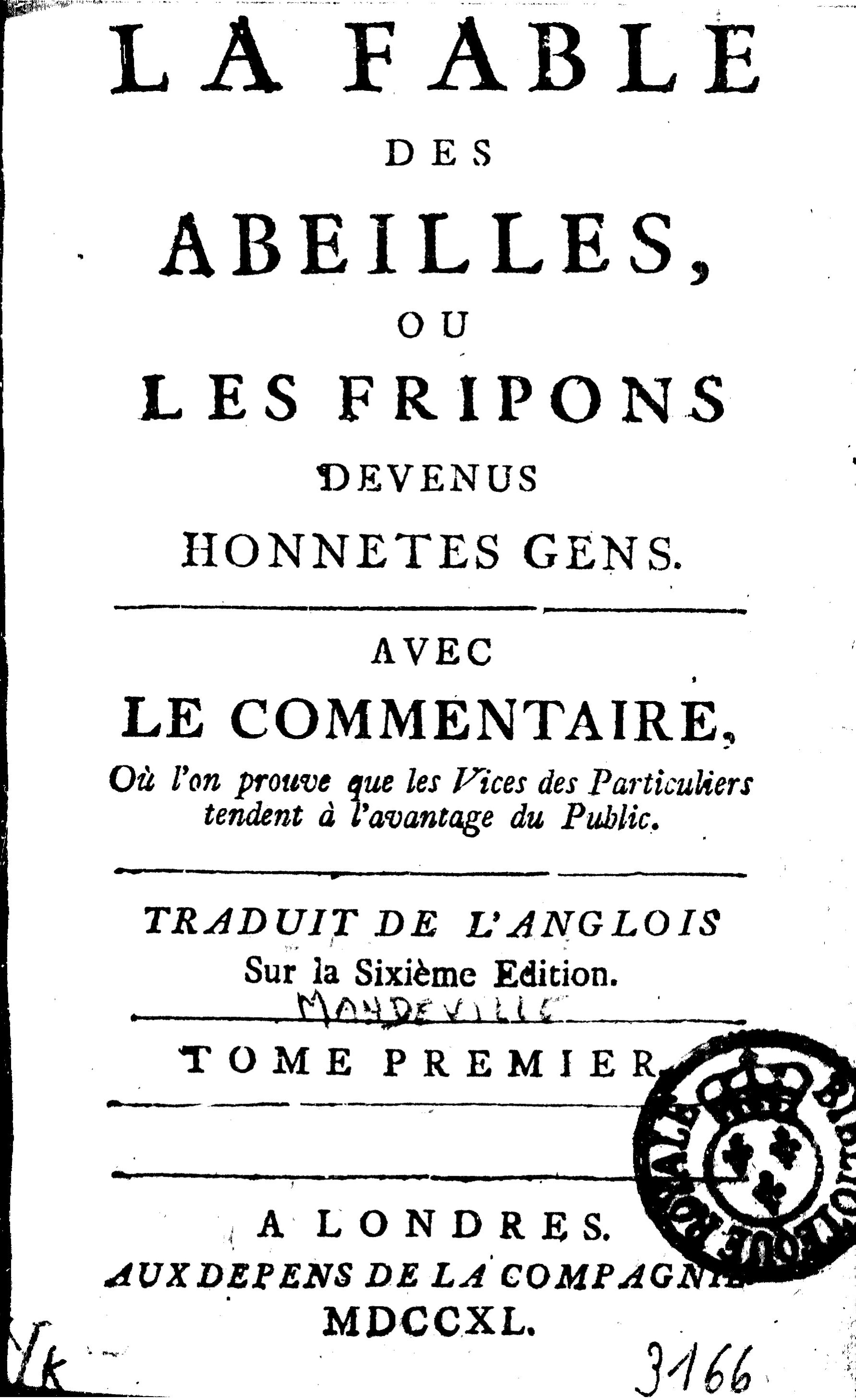 Page de couverture de la traduction française de La Fable des abeilles (1740).